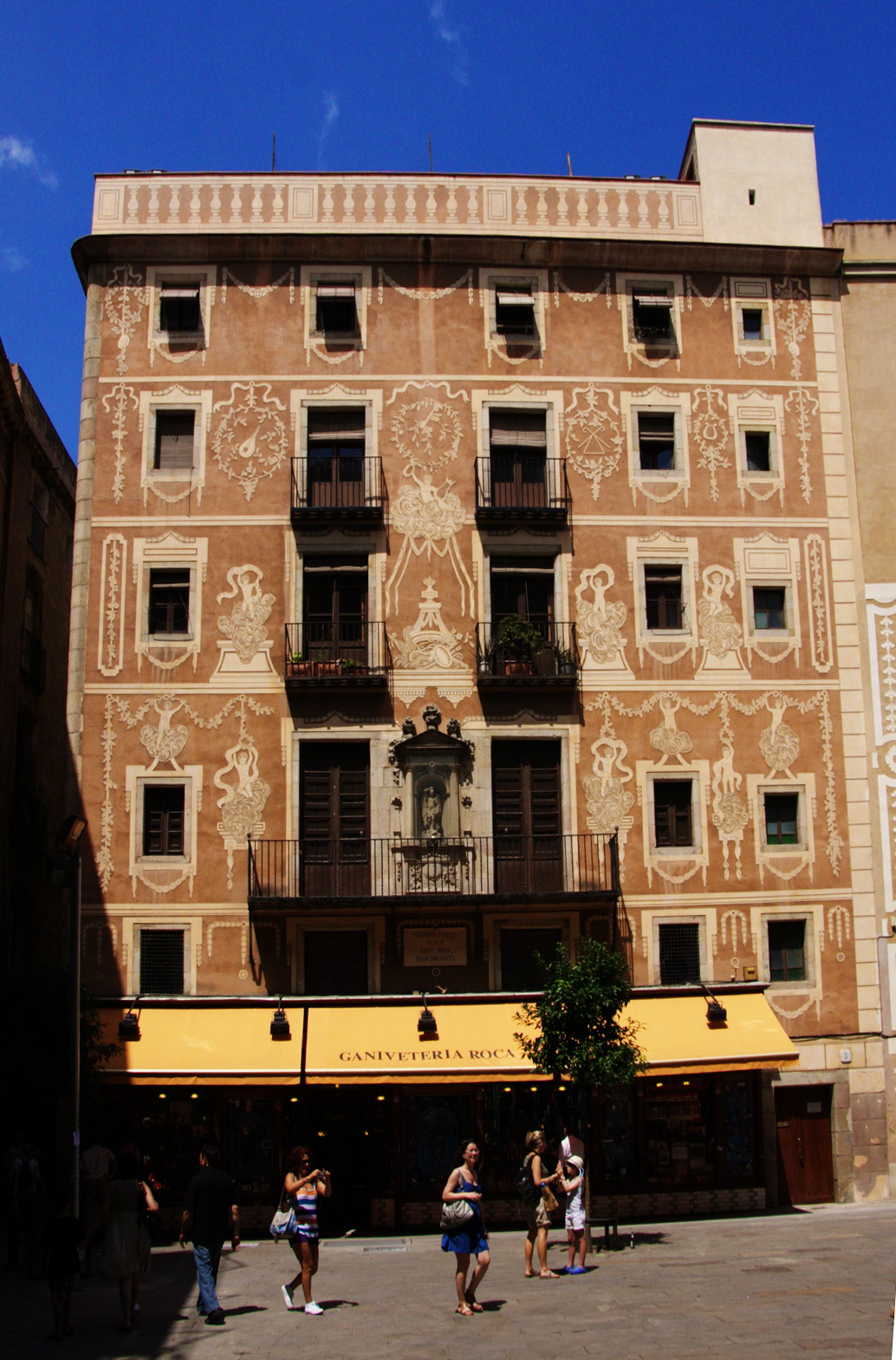 Casa del gremi dels Revenedors (Barcelona)